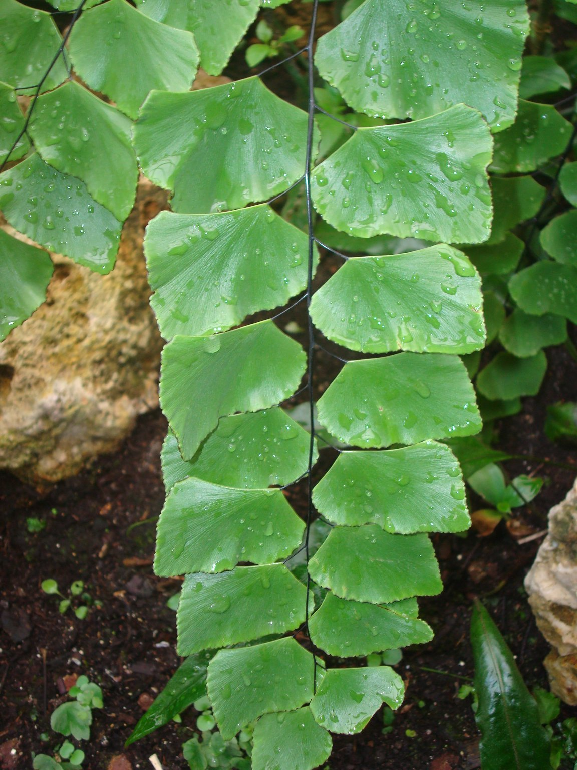 Adiantum peruvianum's leaves, Parc de la Tête d'Or, Lyon